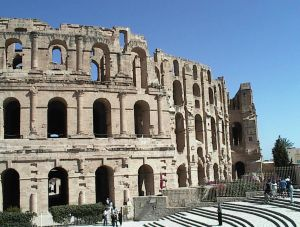 El Jem